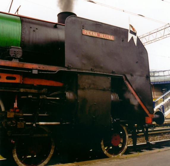 Parowóz Pm36-2